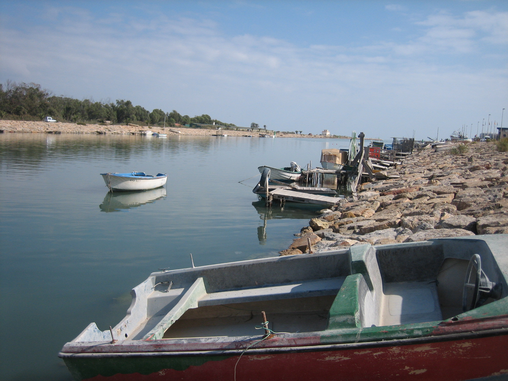 Barcos de pescadores en la desembocadura del río Segura en Guardamar (Alicante, España). Autor: Rodriguillo Fecha: 15/10/2006